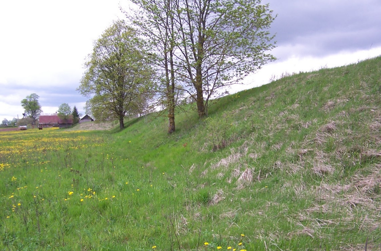 Mirabelio dvarvietė